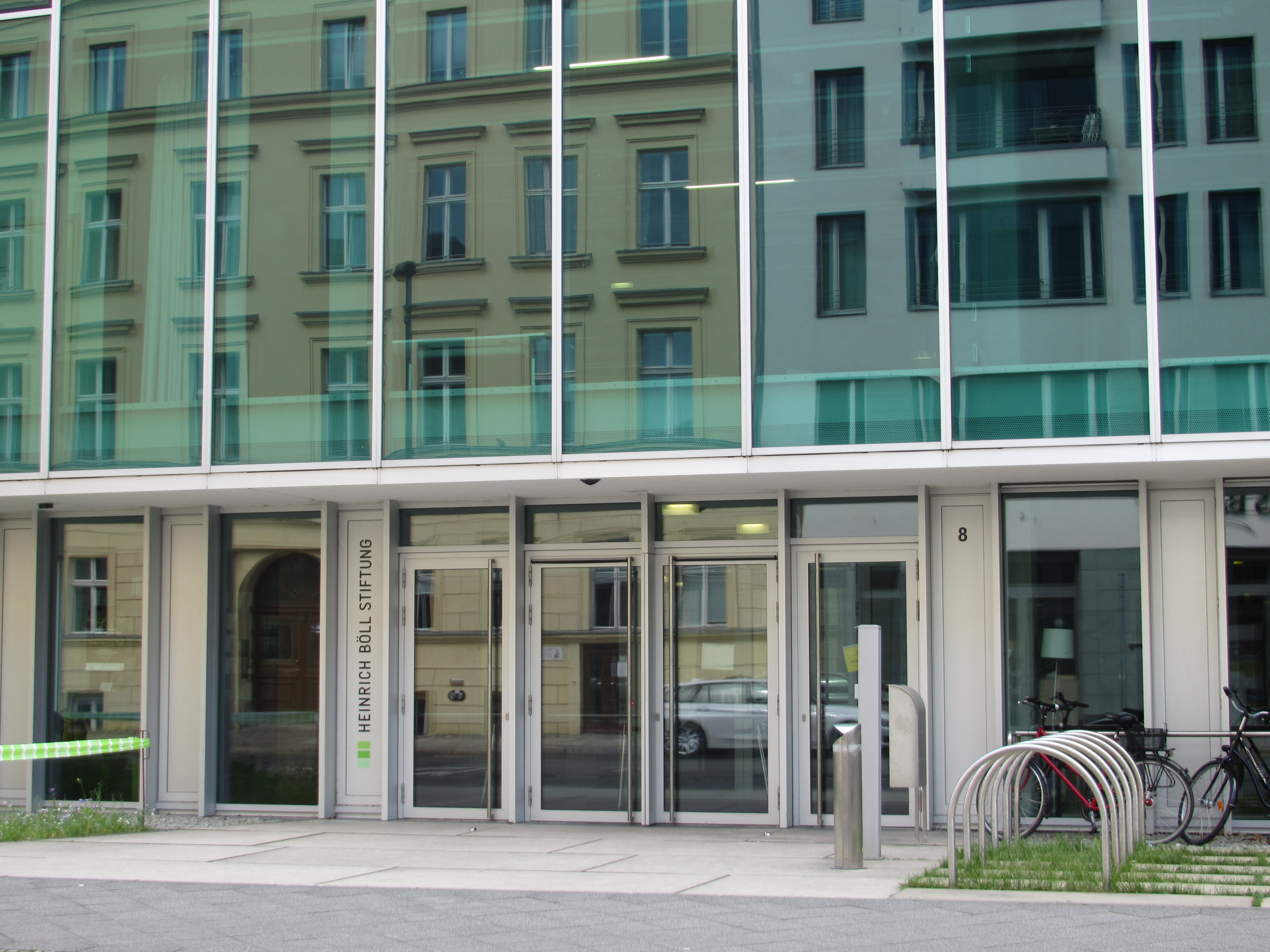 Zentrale der Heinrich-Böll-Stiftung, 10117 Berlin, Schumannstaße 8, am 31.05.2014